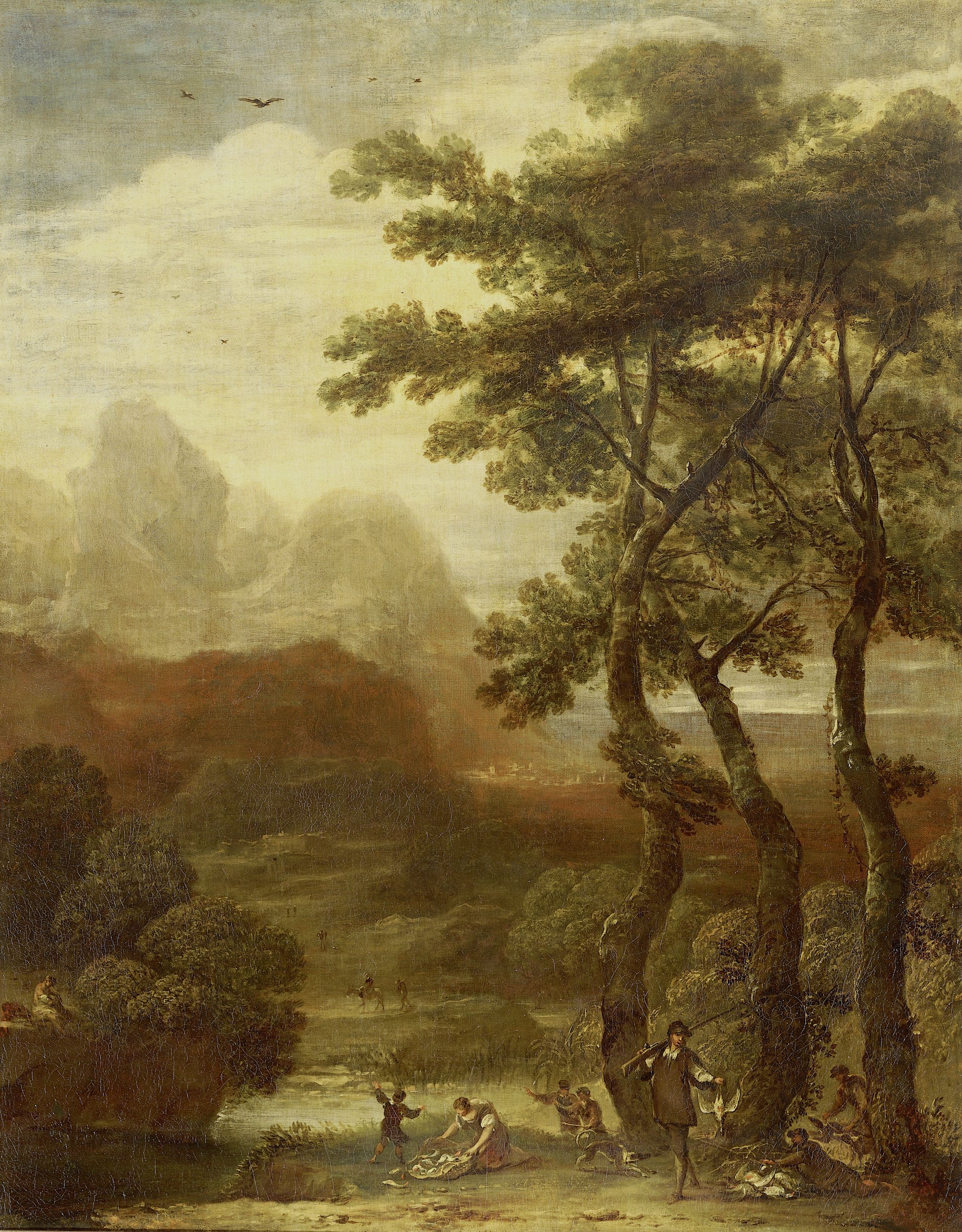 Landschap met op de voorgrond jagers onder een groep van drie bomen. In de verte een stad gelegen aan de voet van een gebergte.